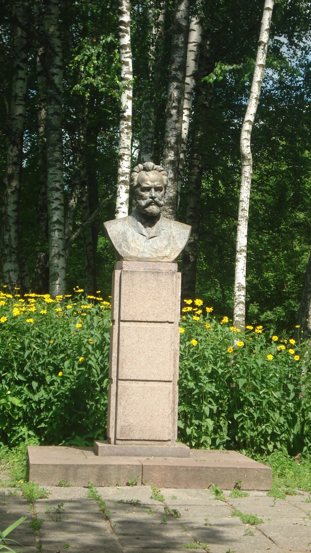 Пам'ятник Чайковському в смт. Низи (Сумська обл.)